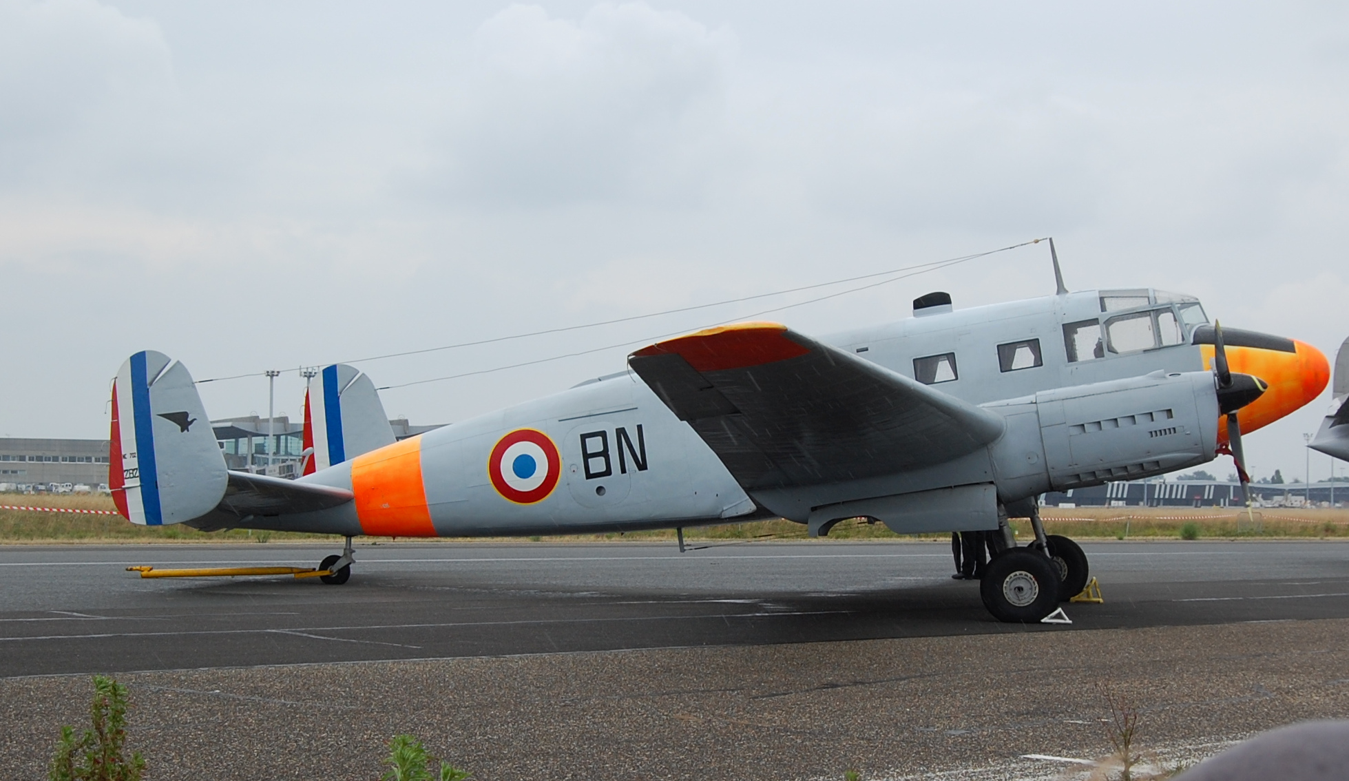 SNCAC NC 702 Martinet aux 100 ans de l'aviaition à Mérignac.